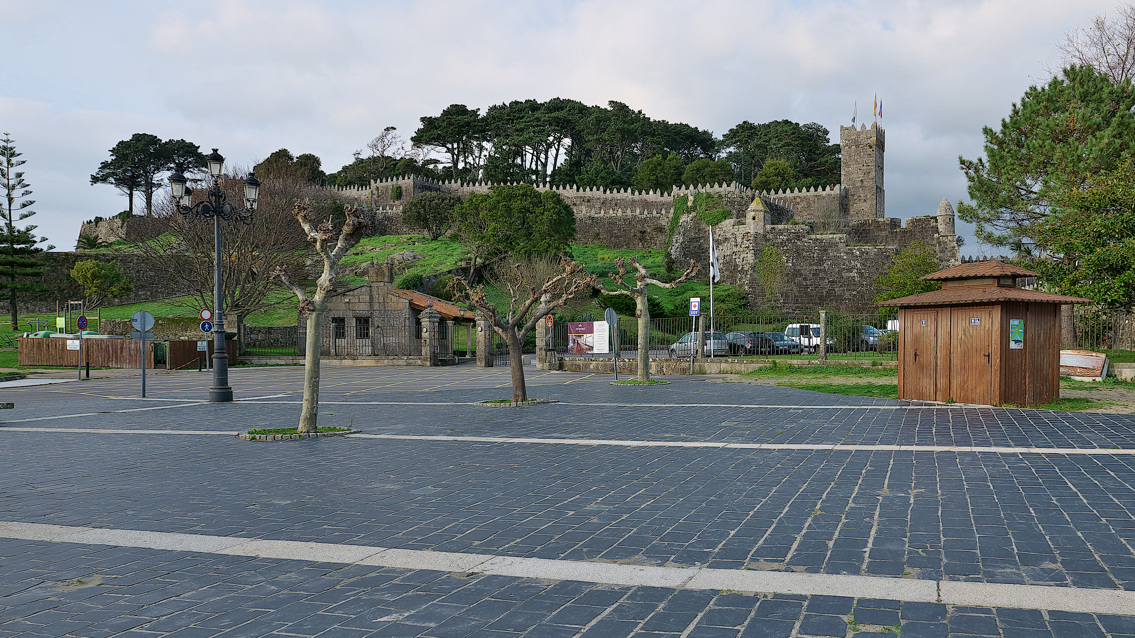 Diego Sarmiento de Acuña, I conde de Gondomar, reformó la fortaleza.